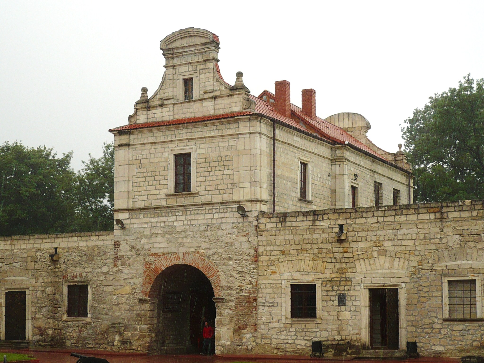 Zbaraż, budynek bramny